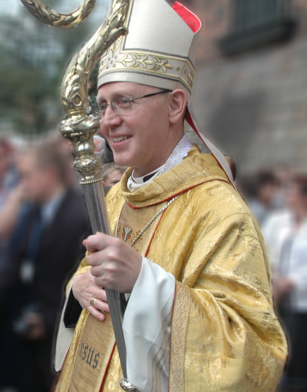 Biskup Piotr Libera po uroczystym ingresie w Płocku